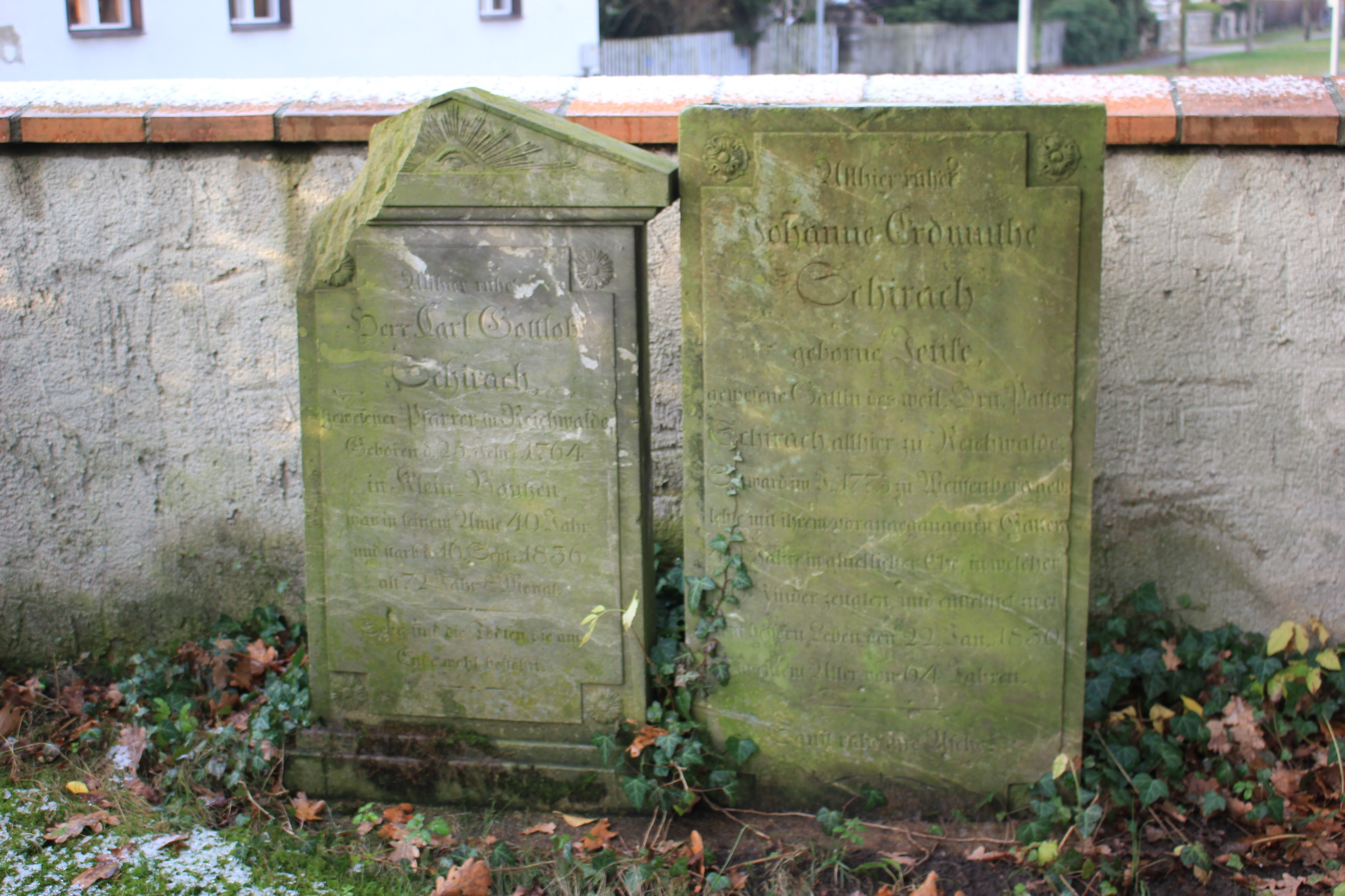 Hornjoserbsce: Narownej kamjenjej fararja Korle Bohuchwała Šěracha a jeho žony w Rychwałdźe.